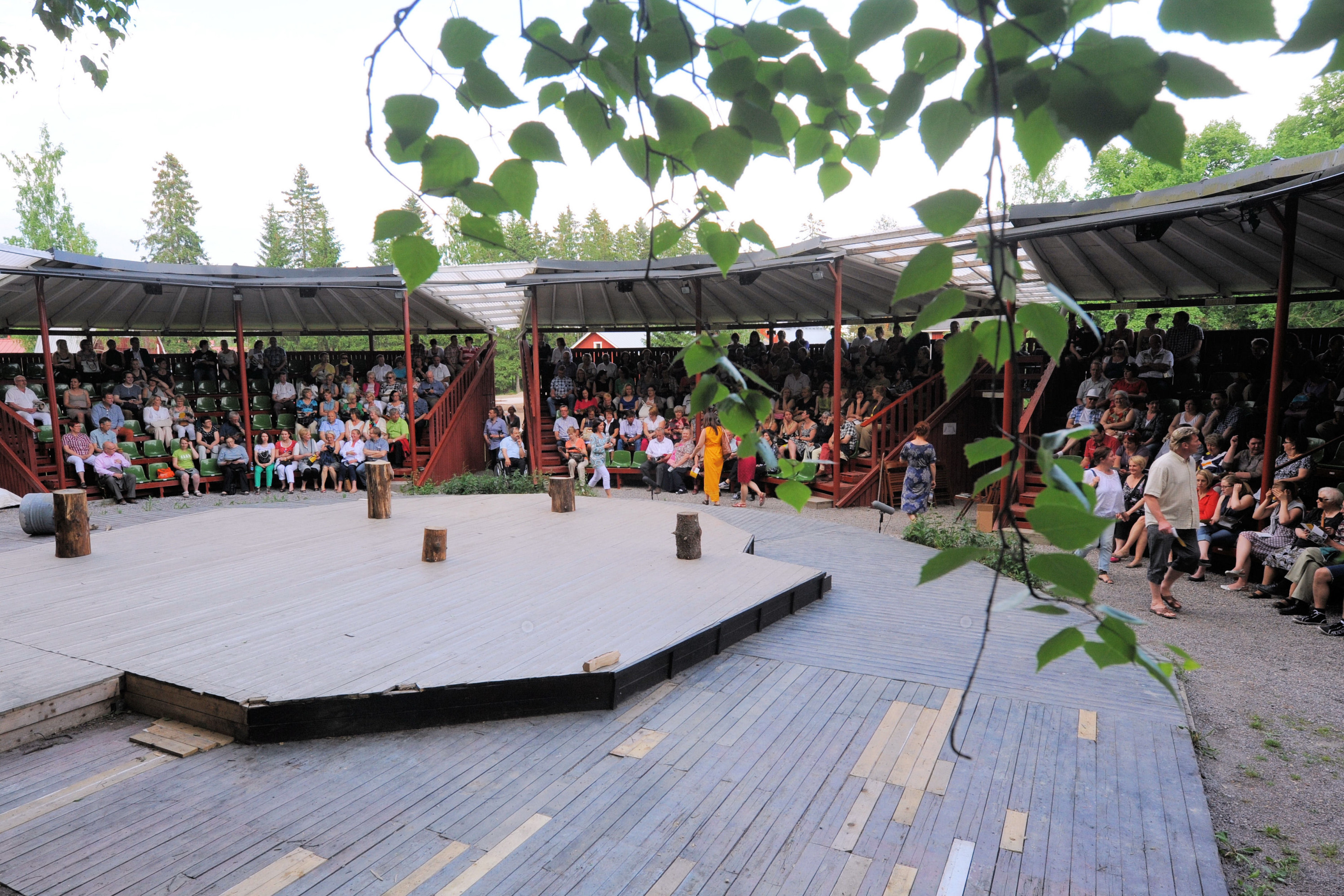 Krapin kesäteatteri